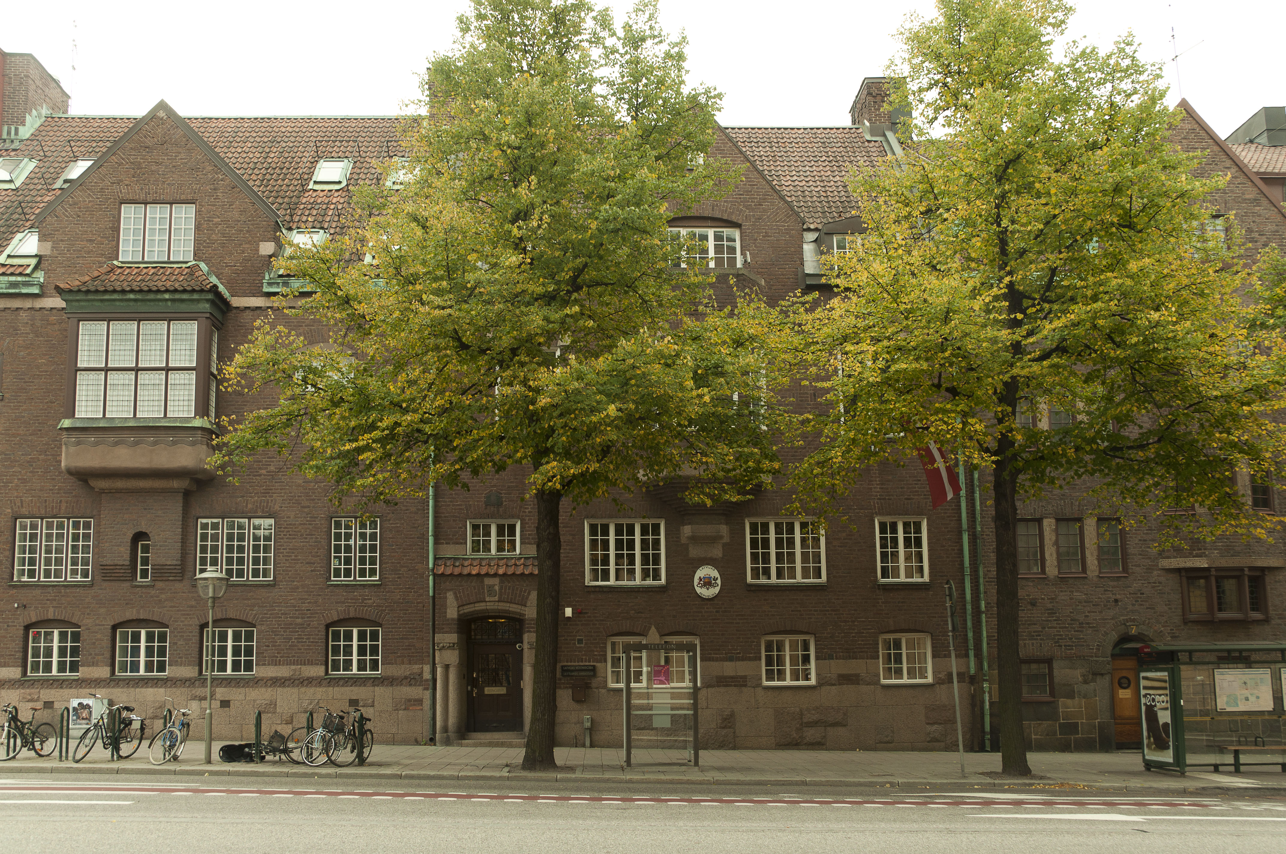 Odengatan, Stockholm. Från vänster; Odengatan 3 (Tofslärkan 7): Byggnadsår 1909-10, arkitekt och byggherre Folke Zettervall, byggmästare F Dahl. Odengatan 5 (Tofslärkan 6) Byggnadsår 1912-14, arkitekt Folke Zettervall, byggherre och byggmästare R Edblom. Byggnaden fungerar som Lettlands ambassad, Odengatan 7 (Tofslärkan 5) Byggnadsår 1912, arkitekter G Lindén & Co Almqvist, byggherre och byggmästare N Persson